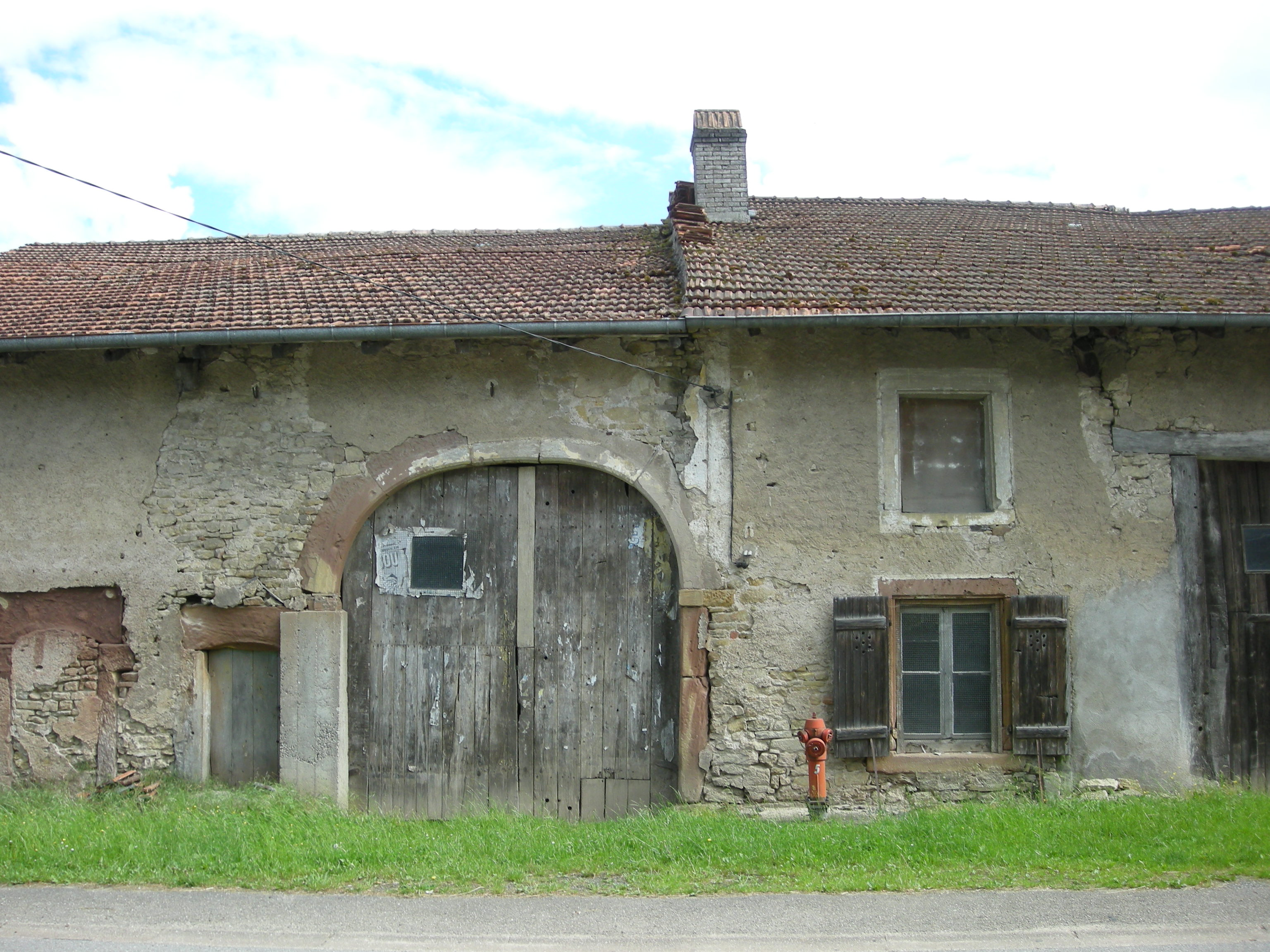 Vieille ferme à Glonville (Meurthe-et-Moselle)